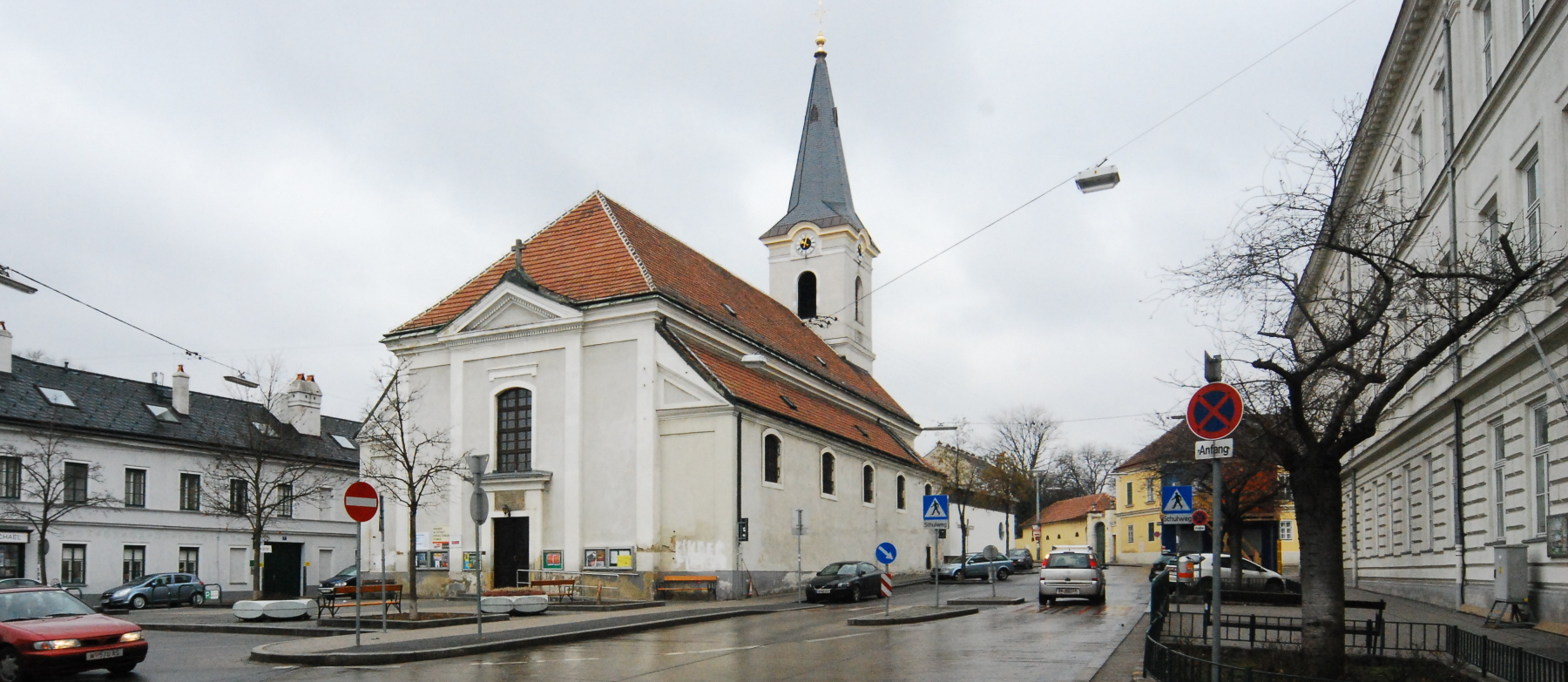 Atzgersdorfer Pfarrkirche in Wien-Liesing